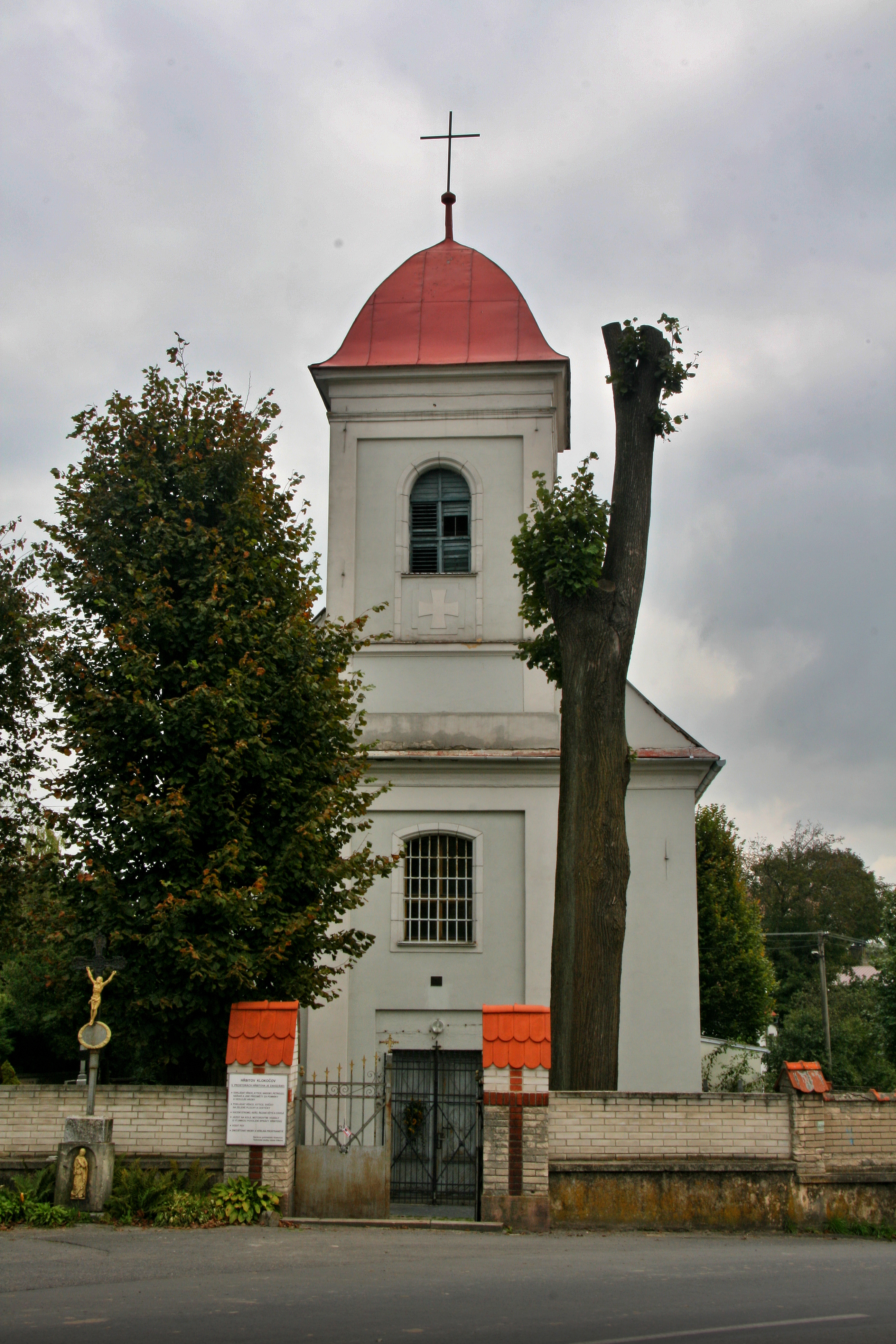 Kostel svatého Ondřeje, Klokočov (Vítkov).